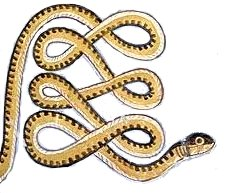 Version d'Apep sans cadre